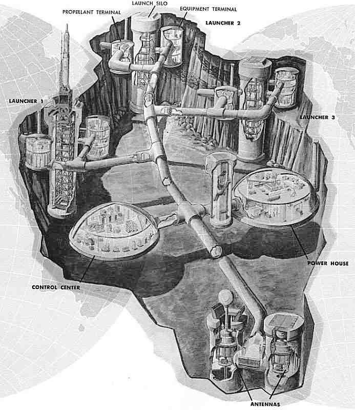 Complesso sotterraneo del missile Titan 1 Immagine del governo americano, e quindi di pubblico dominio.